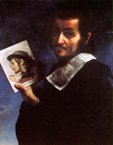 self portrait